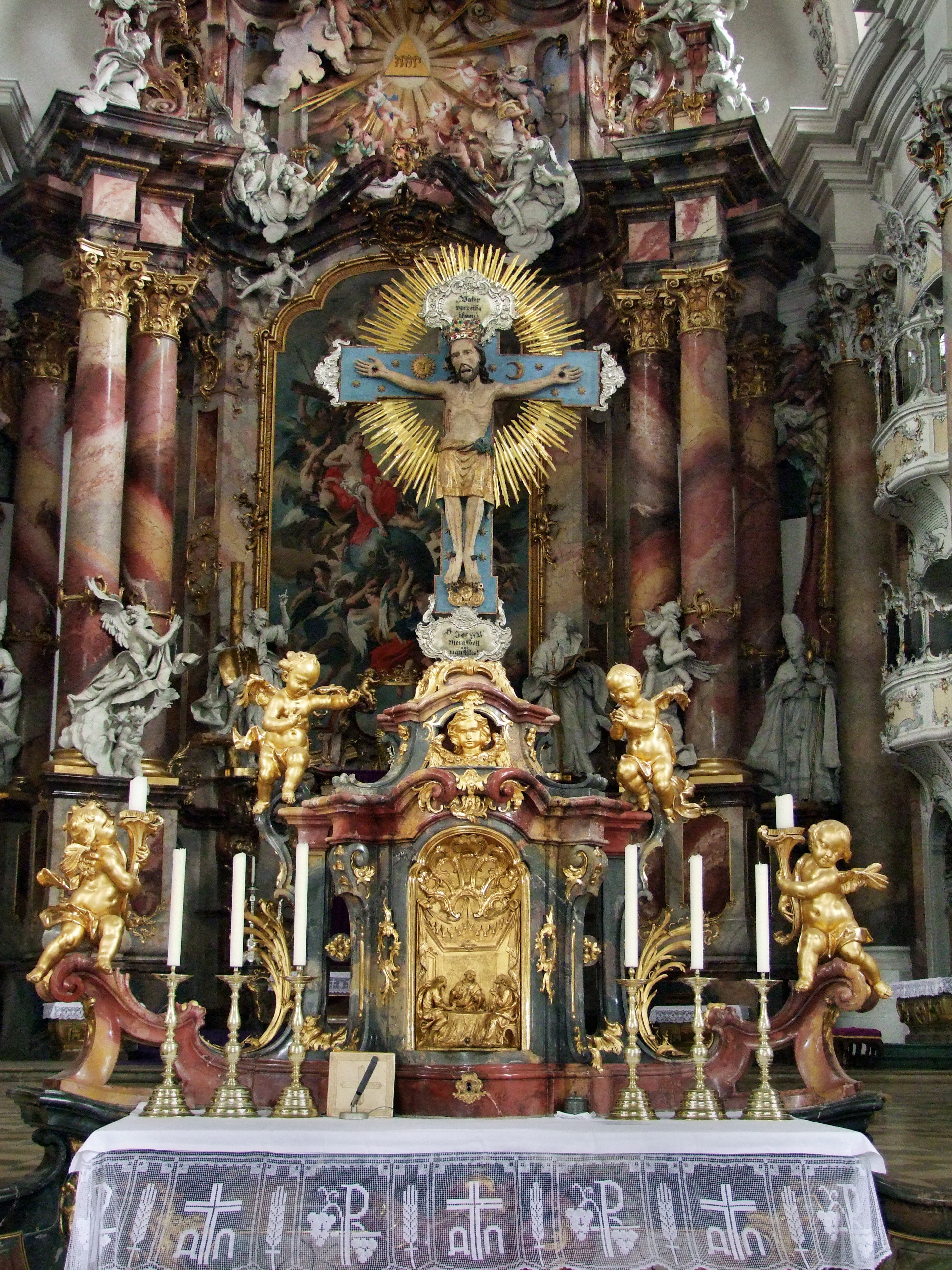 Kreuzaltar (F14), Basilika Ottobeuren